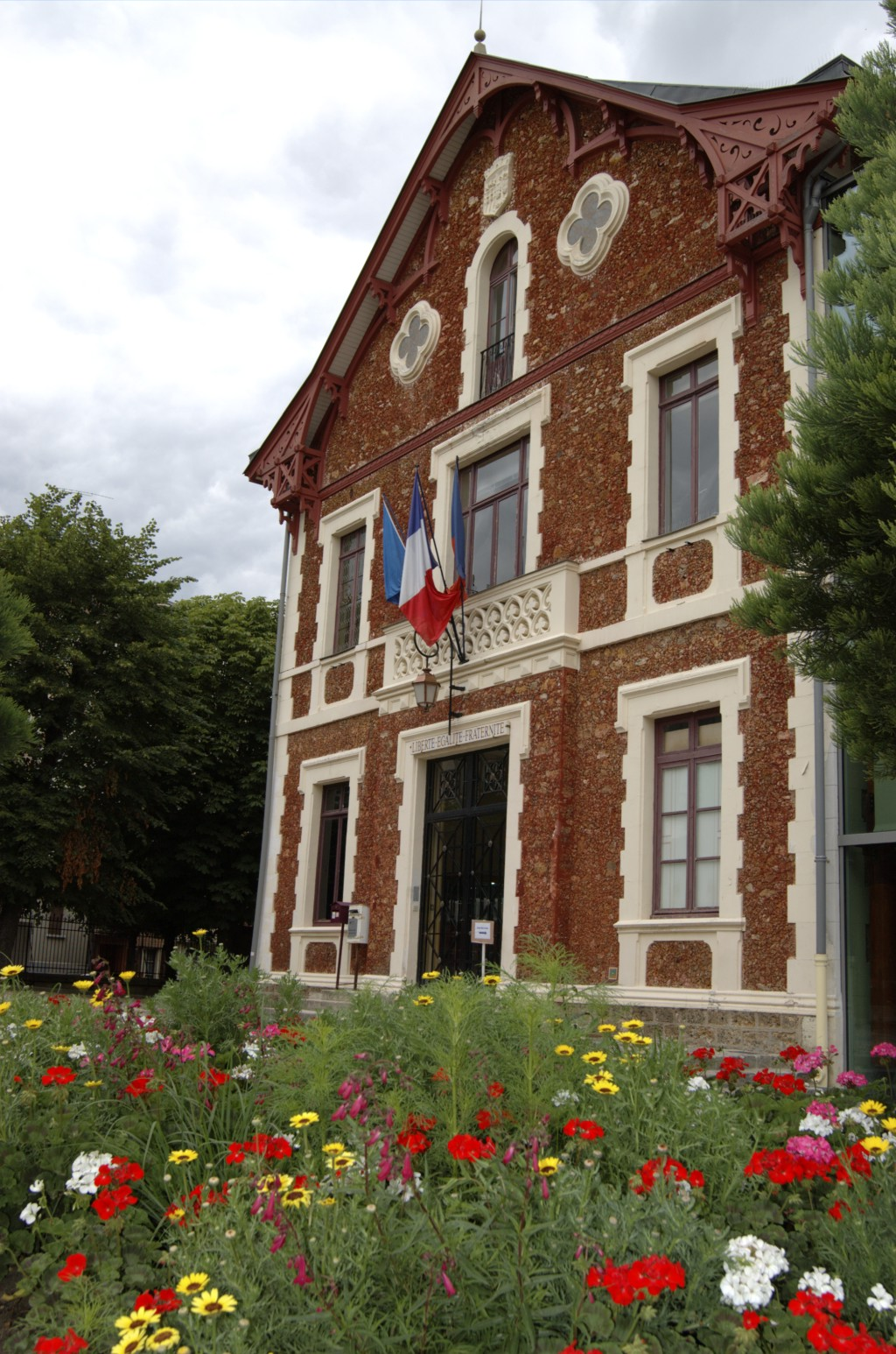 La façade de la mairie de Viroflay (juin 2005)